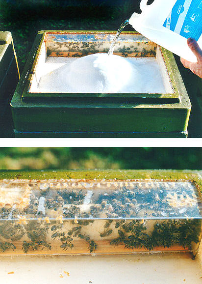 Bienenzuckerfütterung. Auf dem oberen Bild wird Zucker in Futterzarge geschüttet und darüber Wasser zum Auflösen. Im unteren Bild saugen Bienen, die auf einem schwimmenden Holzbrett stehen, die Zuckerlösung auf.